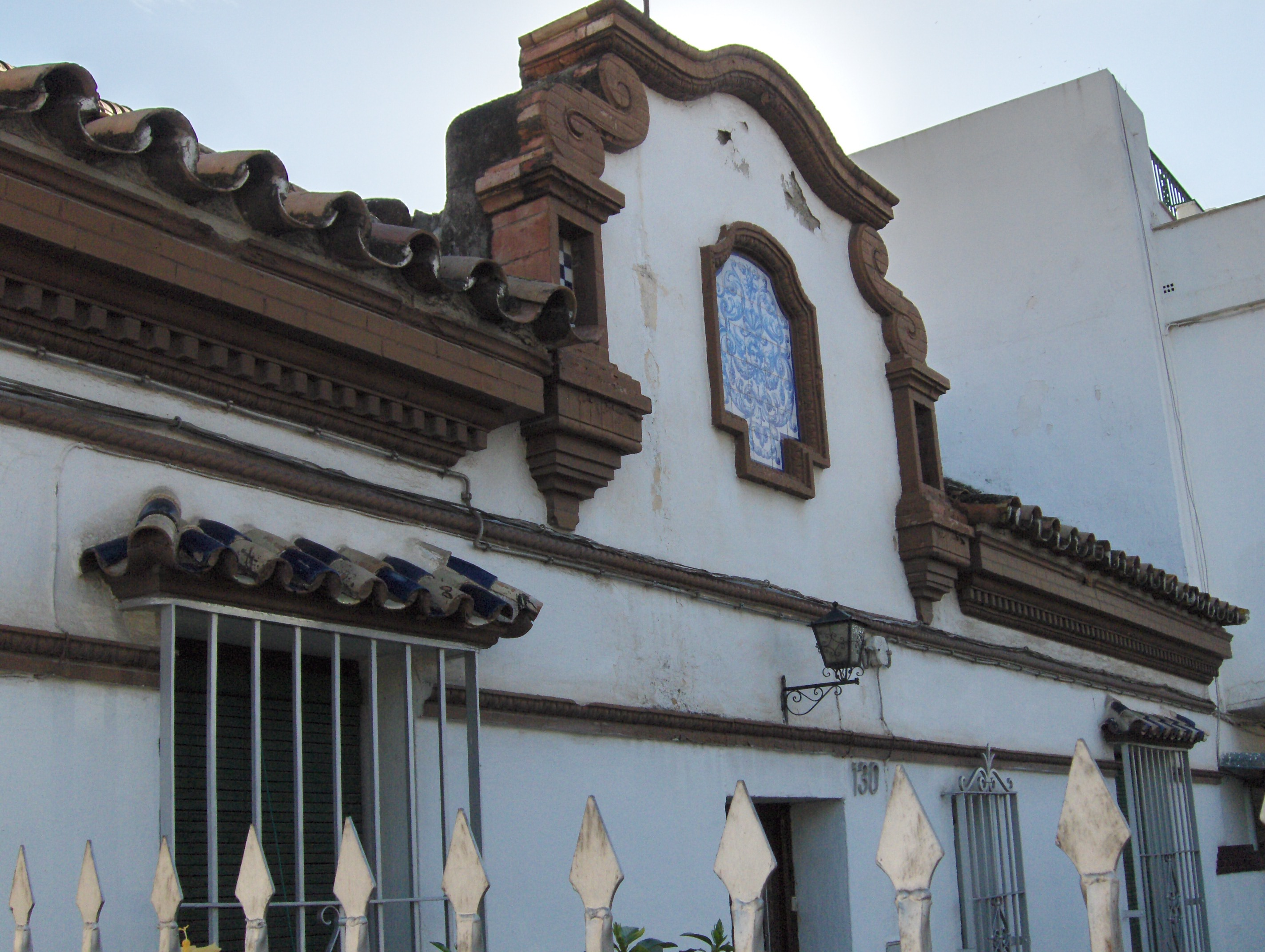 Frontón decorativo de una vivienda de Ciduad Jardín, Málaga, ESpaña.